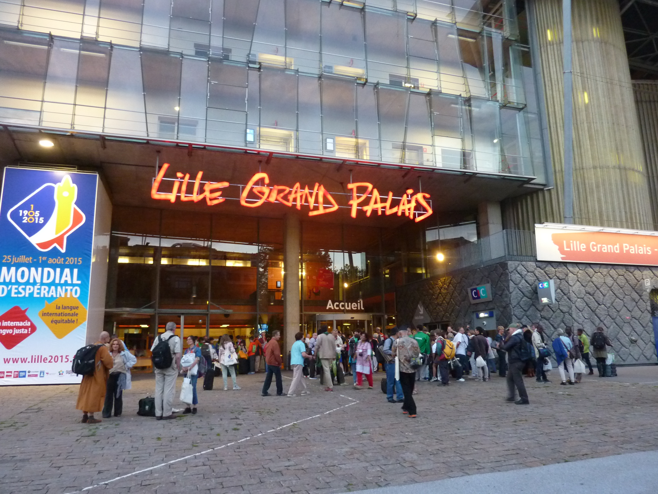 Esperantistoj antaŭ kongresejo de la 100-a Universala Kongreso de Esperanto en Lille (Francio) – Lille Grand Palais